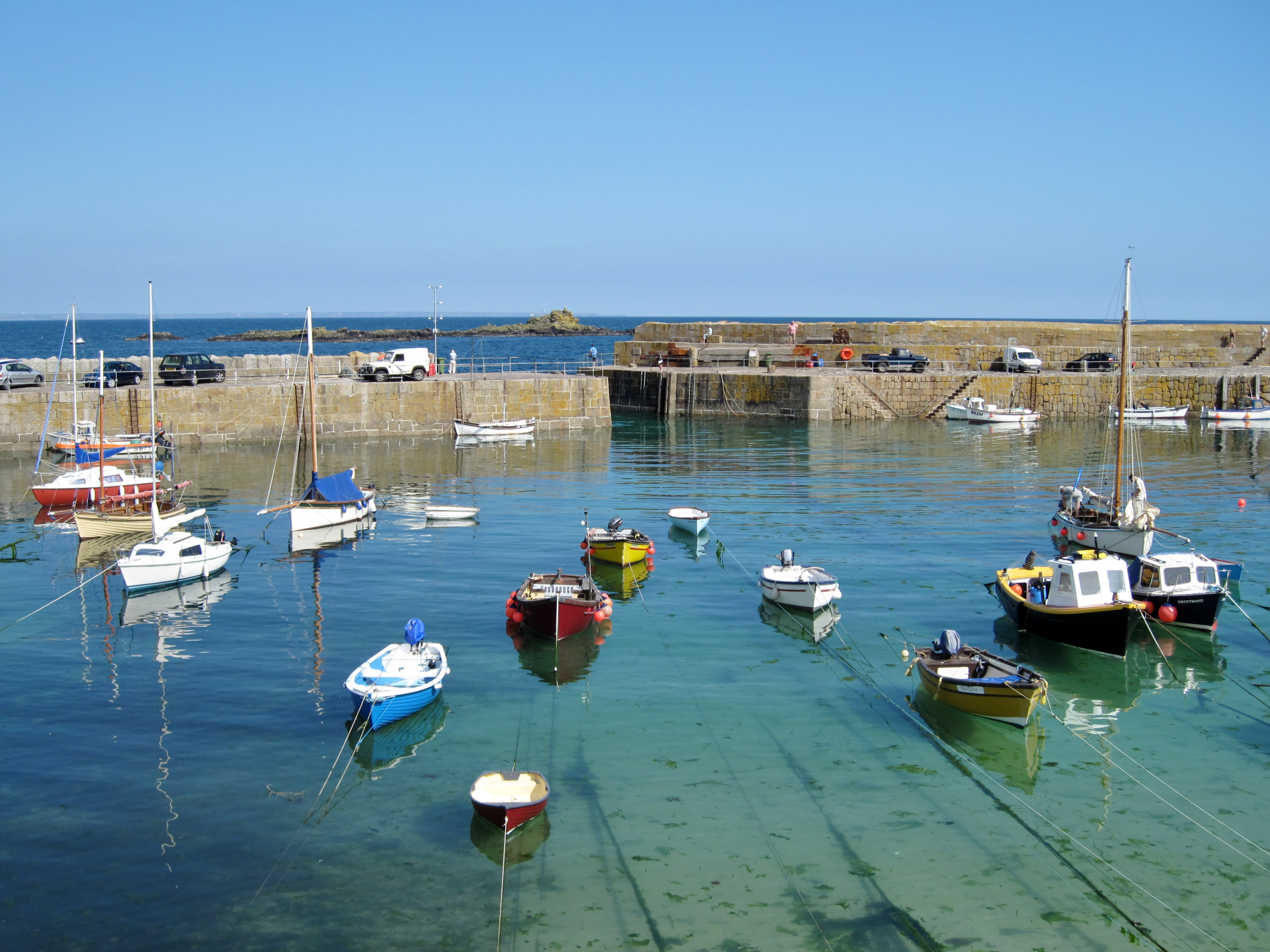 Hafen von Mousehole an der Südküste von Cornwall, England